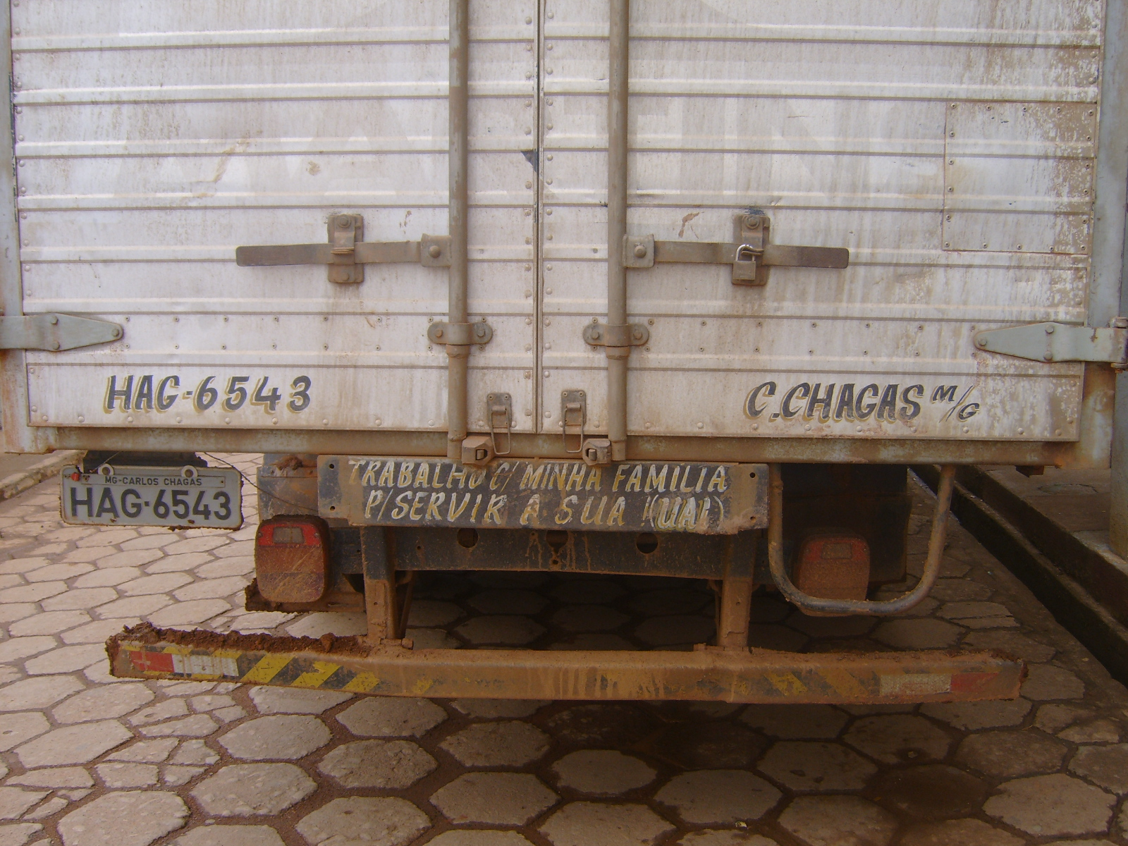 Frase de parachoque de caminhão (quote of truck)